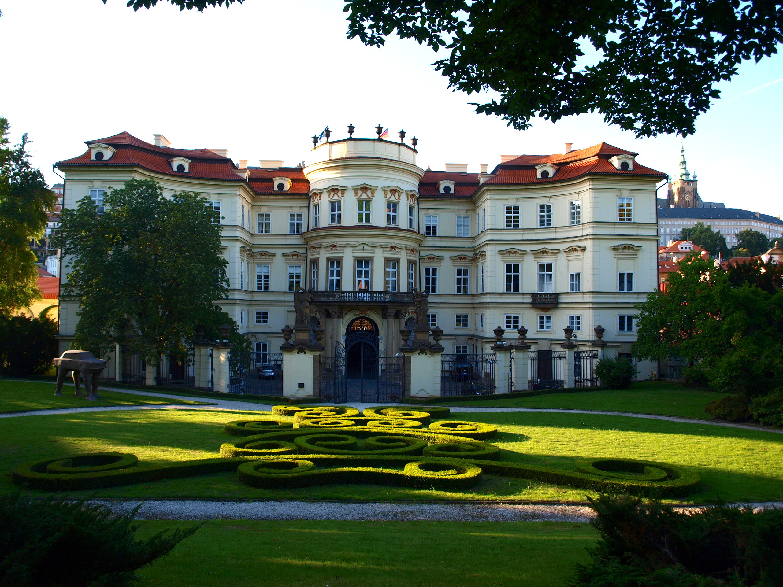 Lobkovický palác Malá Strana